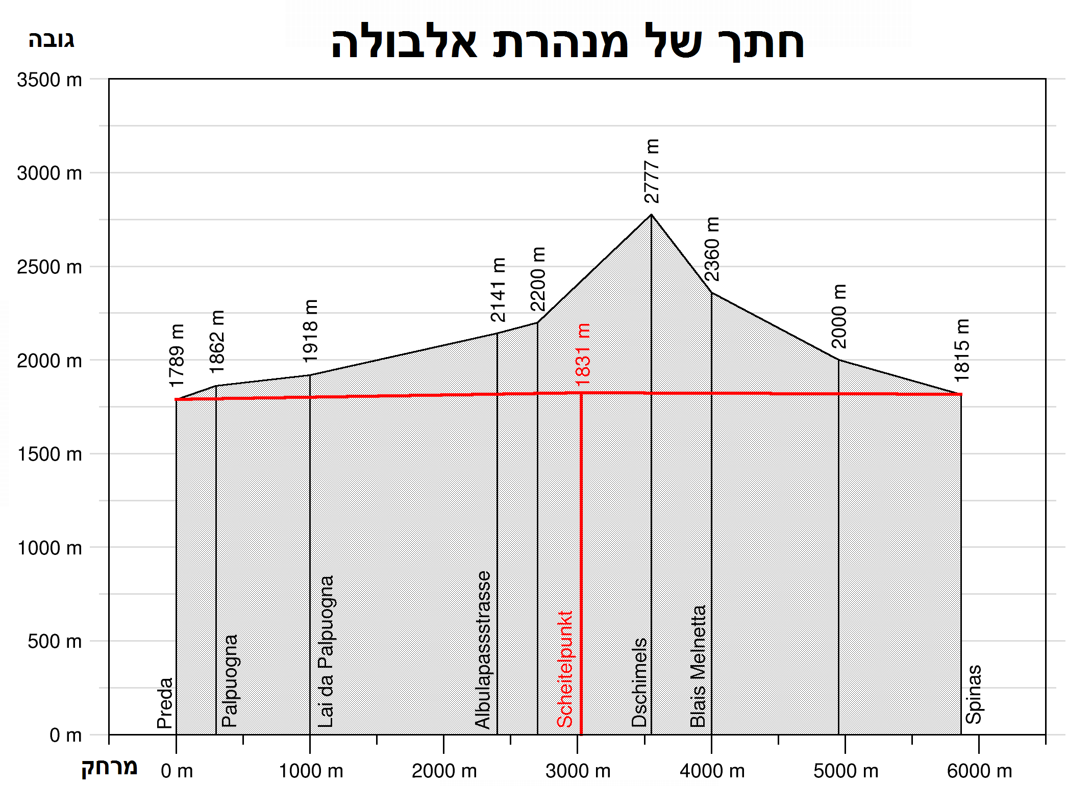 Gebirgsüberlagerung über dem Albula-Eisenbahntunnel in der Schweiz